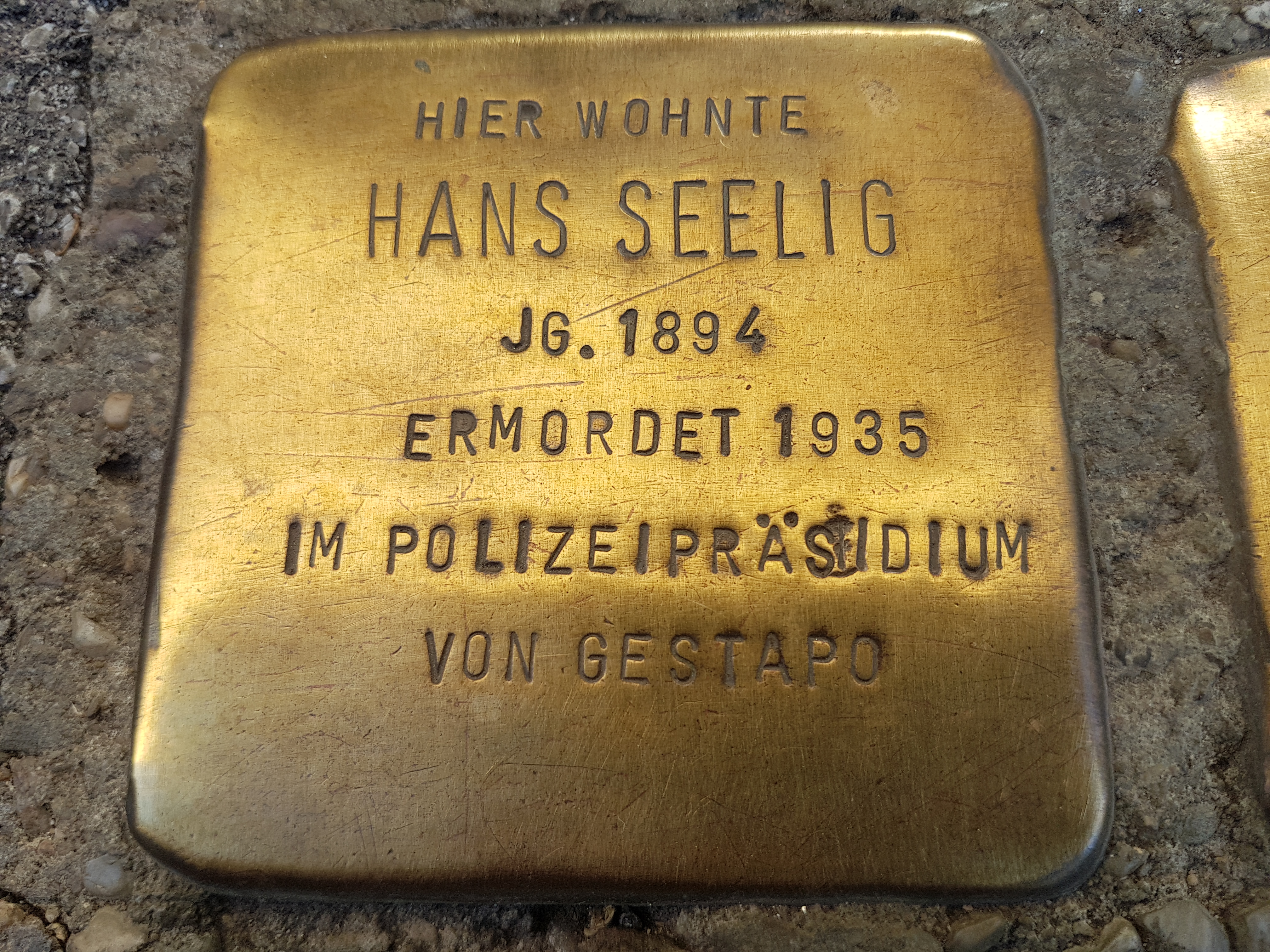 Stolperstein Duisburg Hans Seelig